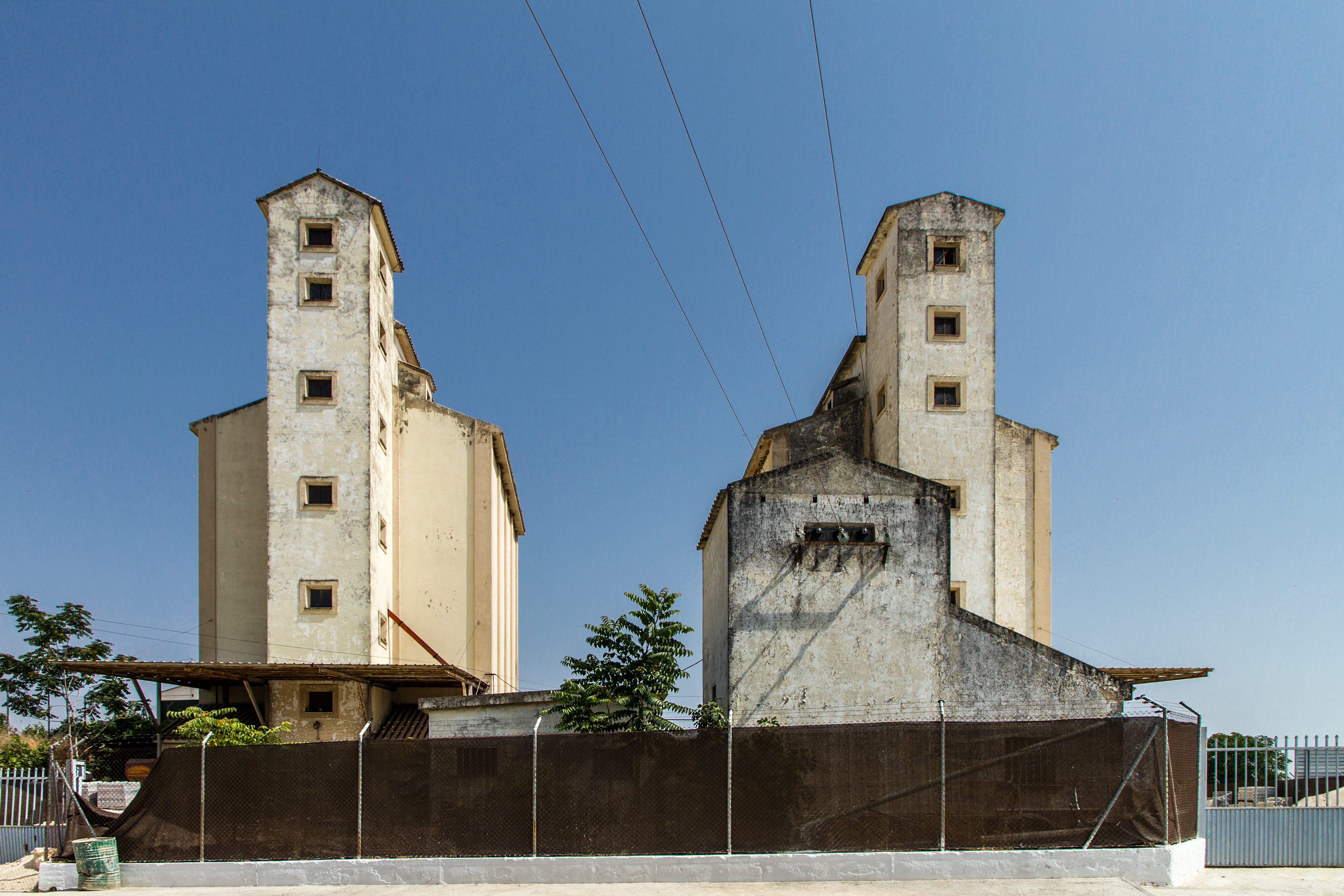 silos Silos en Andalucía. ¿Porcuna?